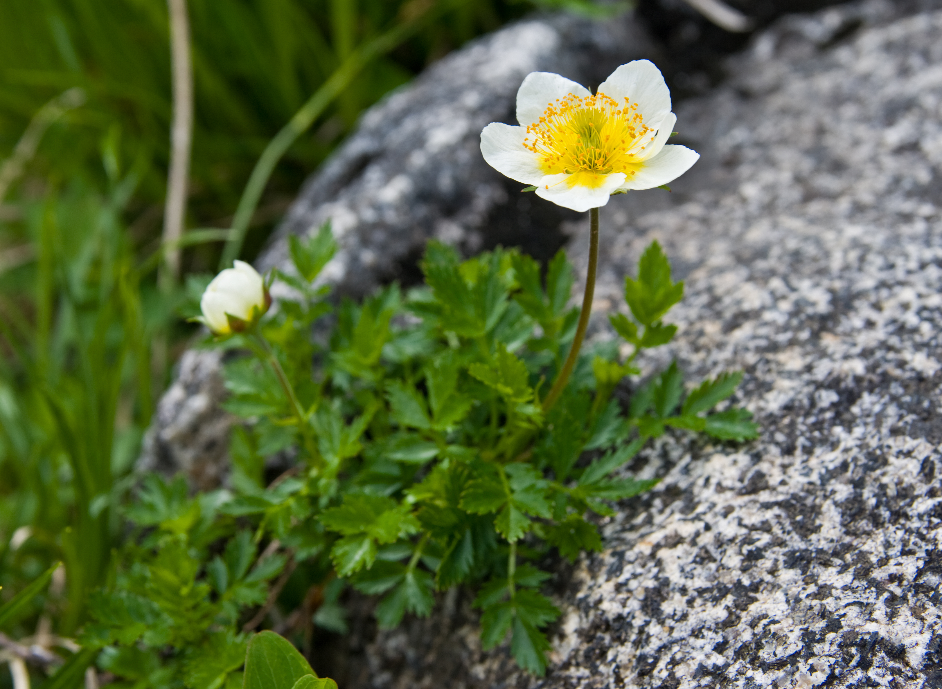 チングルマ (学名:Geum pentapetalum)